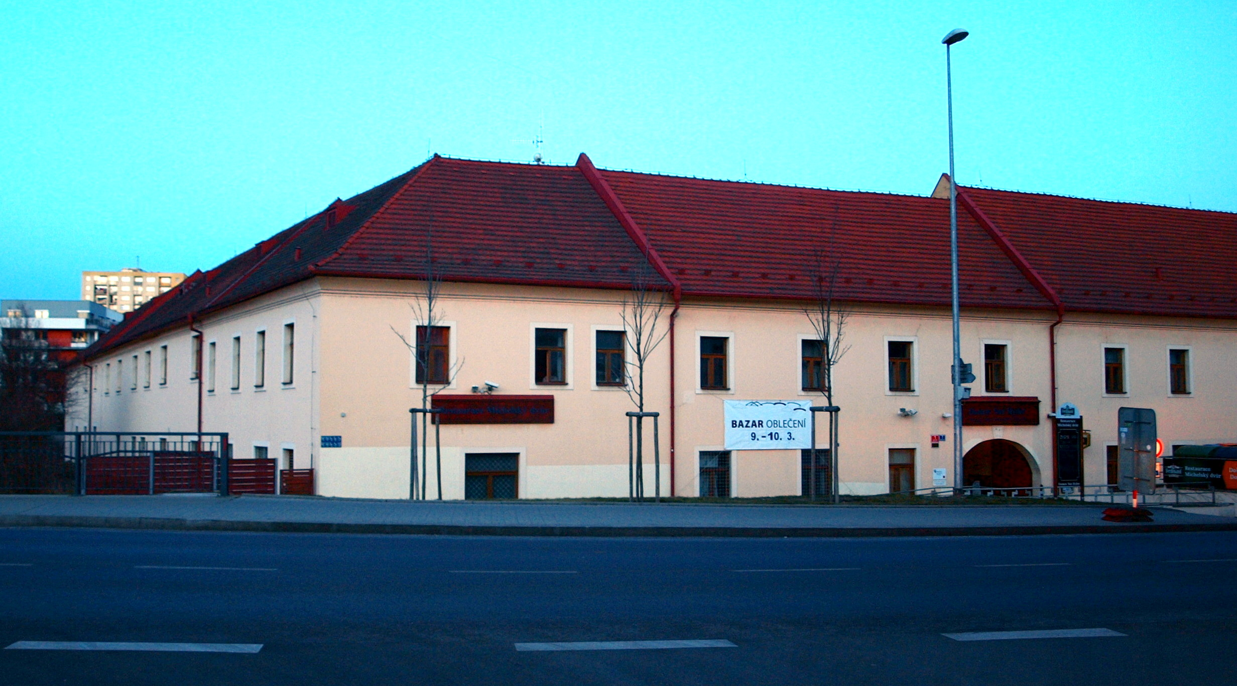 Michelský dvůr